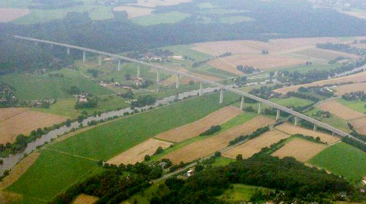 Ruhrtalbrücke aus der Luft